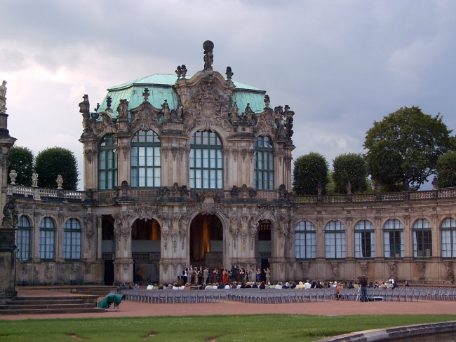 Aufführung der Landesbühnen Sachsen im Dresdner Zwinger Performance of the Landesbühnen Sachsen (Saxony’s traveling repertory theater) in the Zwinger Palace in Dresden